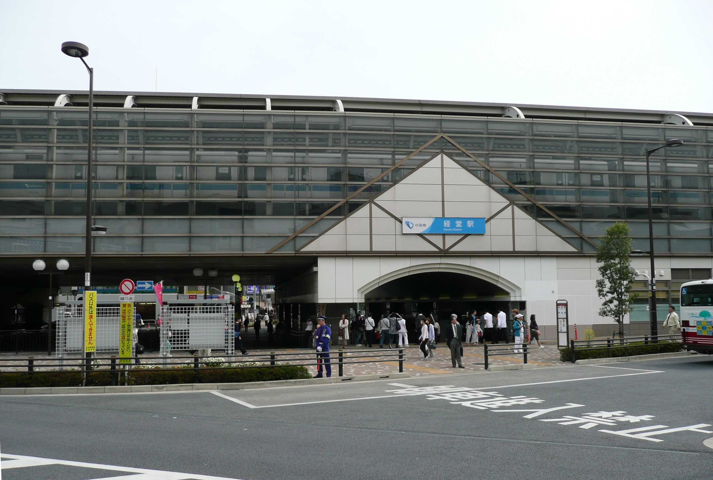 経堂駅北口